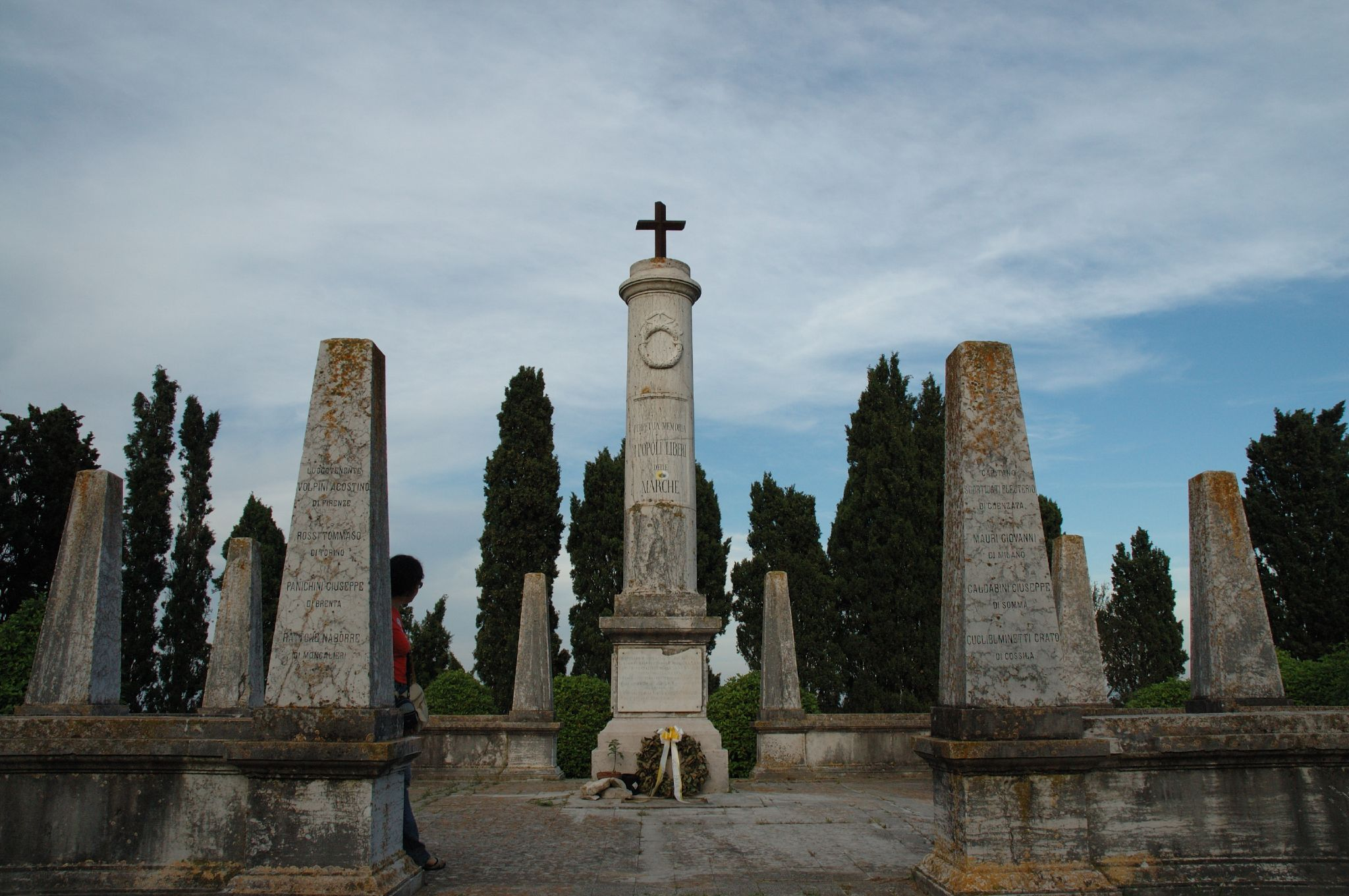 Ossario della battaglia di Castelfidardo a Castelfidardo, Marche, Italia.